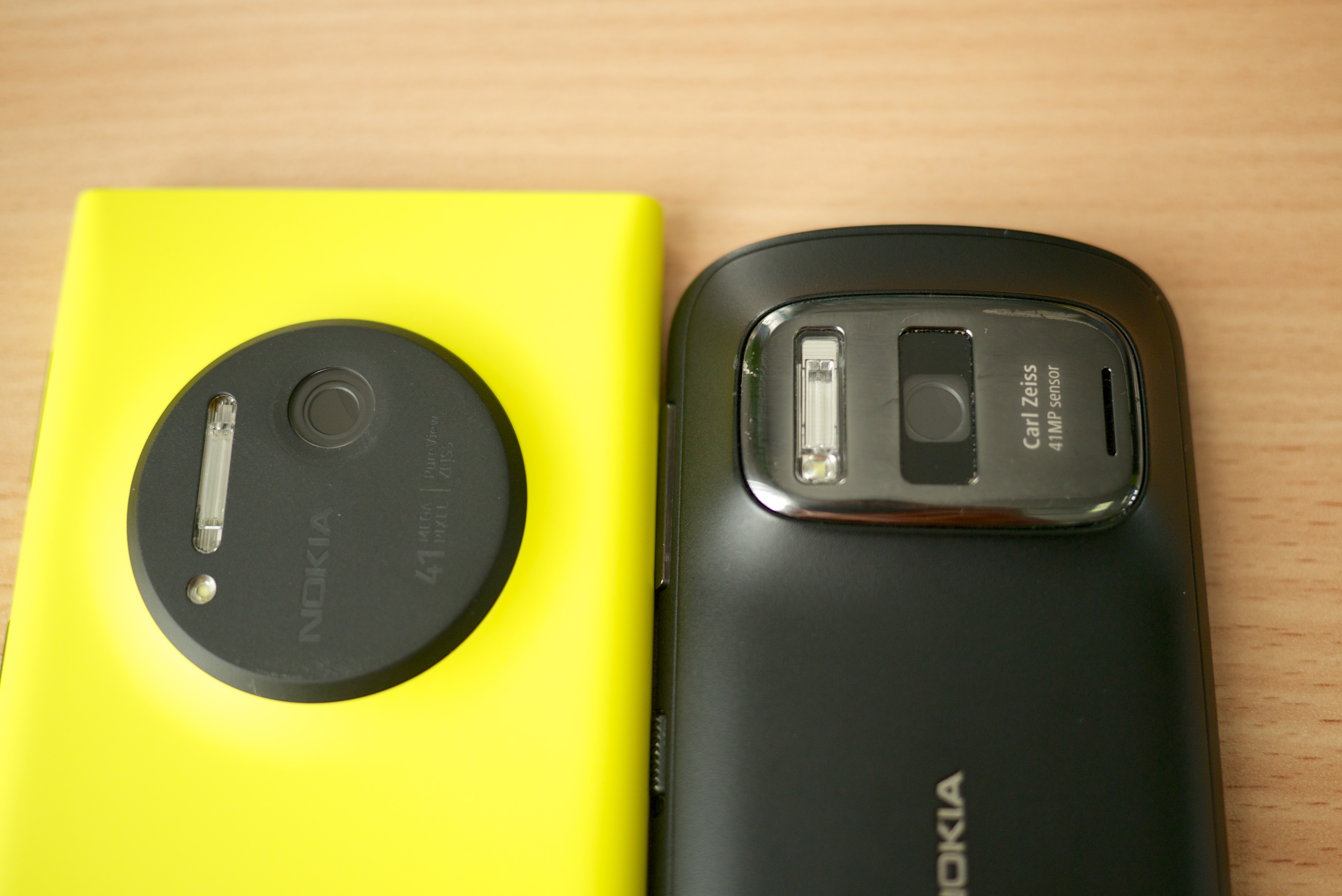 82 megapixels :) Nokia Lumia 1020 vs. Nokia 808 PureView